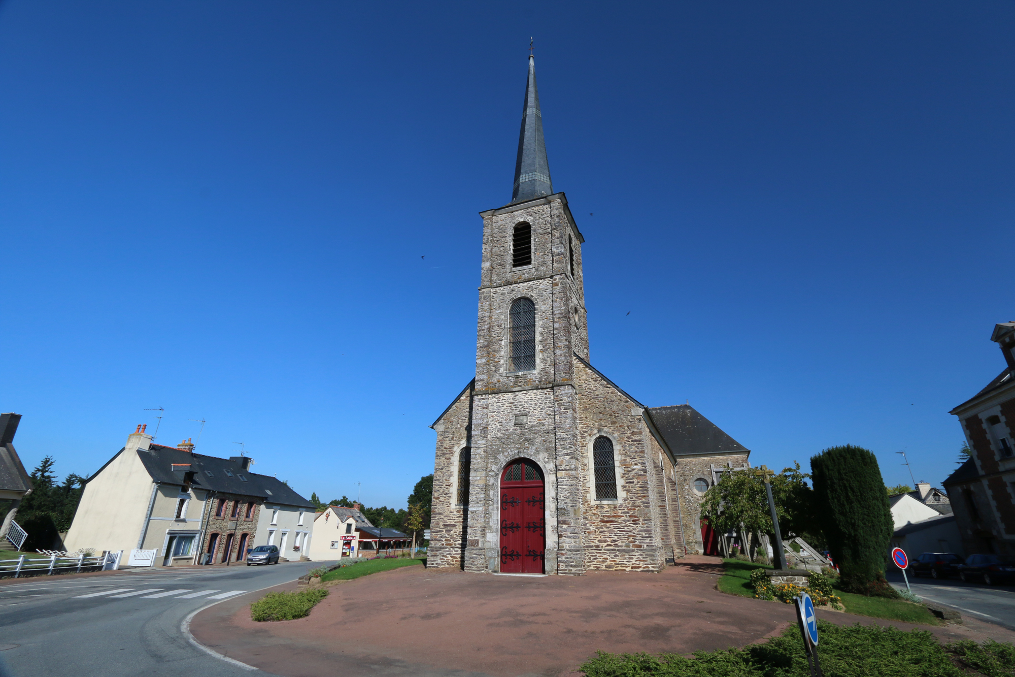 Église de Brie